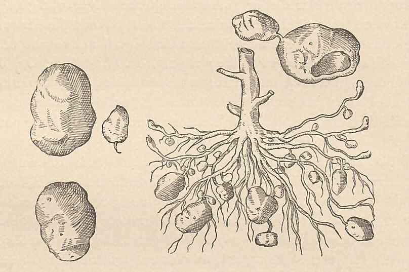 Tubercules, stolons et racines de la pomme de terre